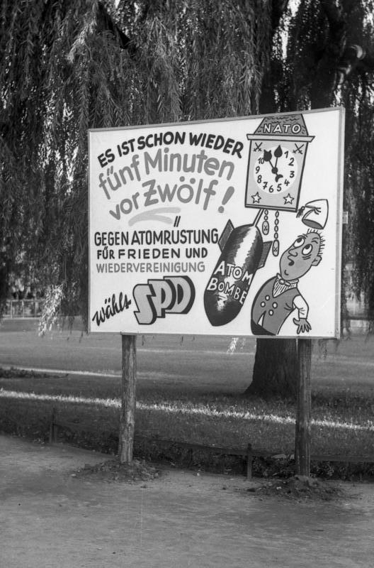 Bundestagswahl, SPD Plakat Zentralbild Hoff 28.8.1957 U.B.z. SPD-Plakat zur Bundestagswahl am 15.September 1957